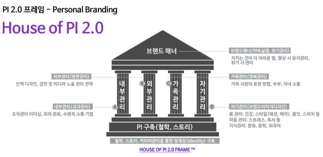 이미지전략가 허은아, PI 2.0 프레임